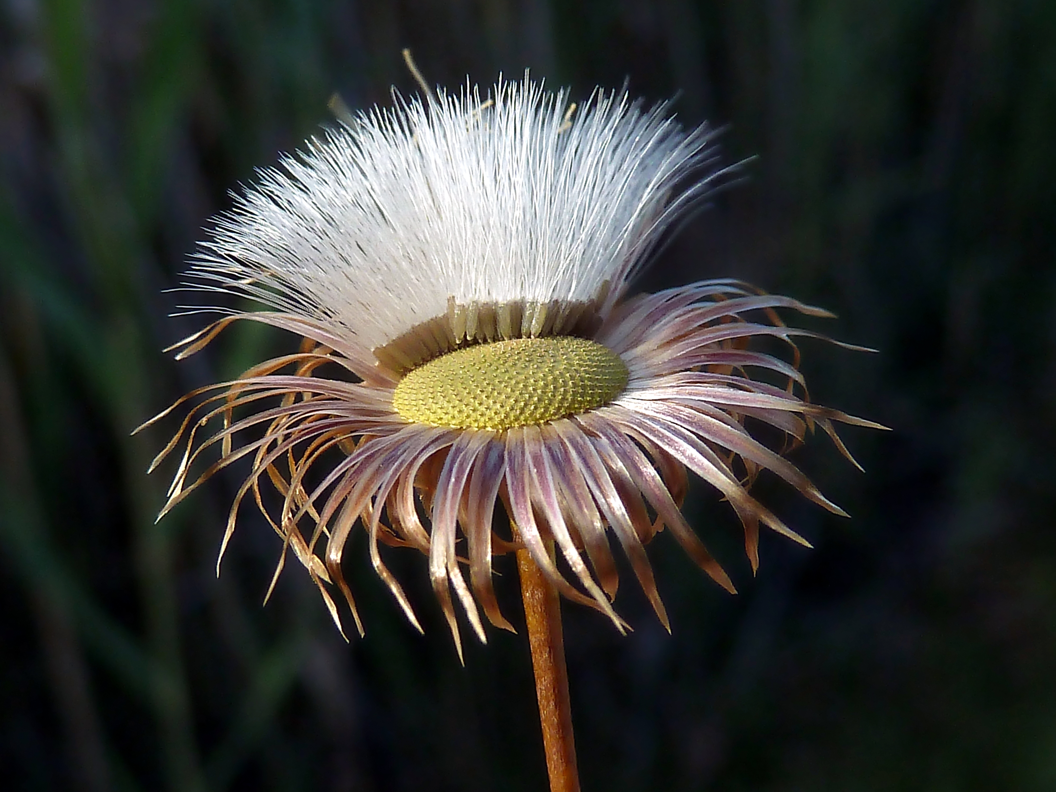 Phagnalon saxatile (Yesca, yesquera) - Capitulo en fructificación. - Camino del Canalillo, Albatera, Provincia de Alicante (España).